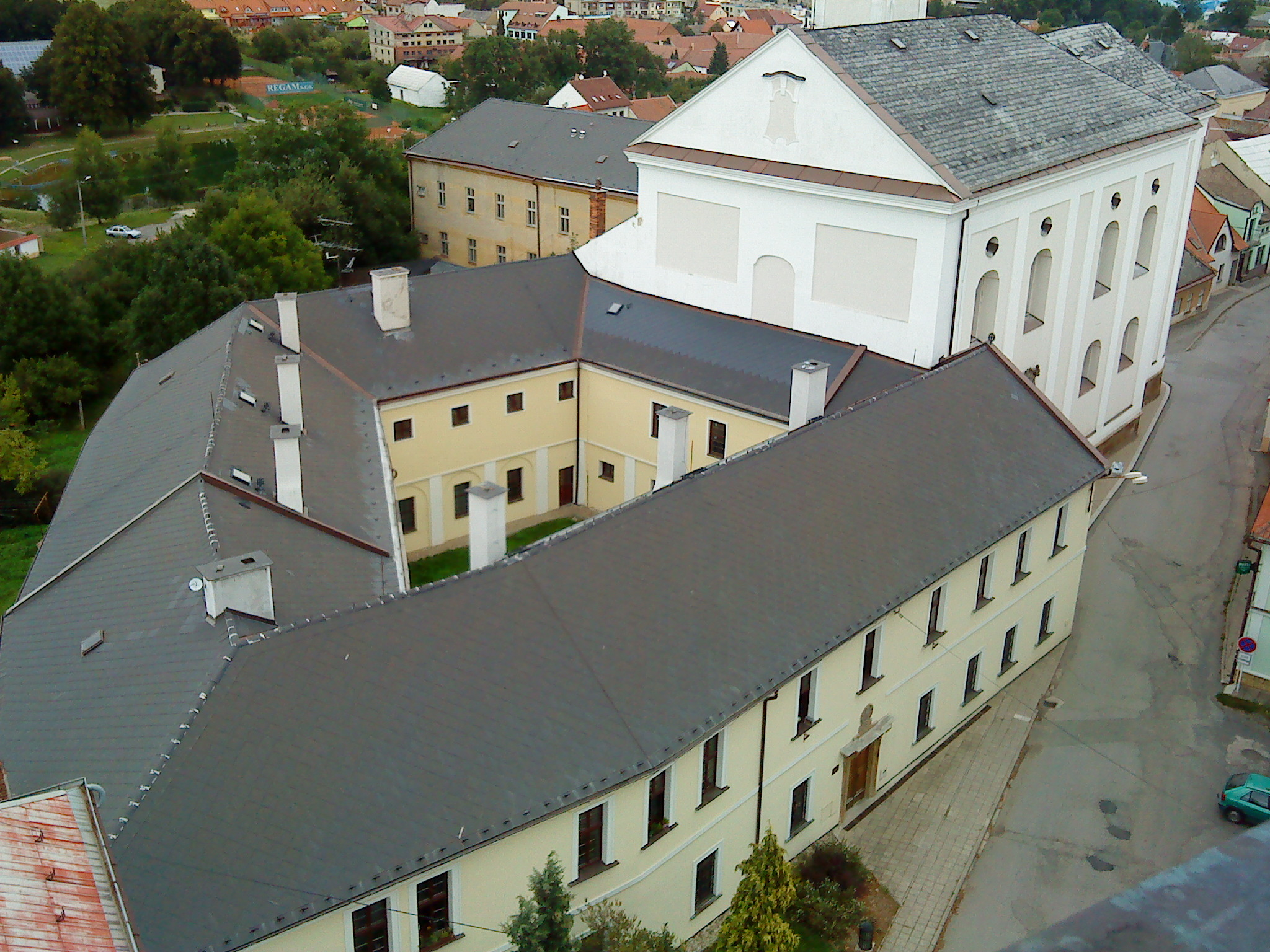 Klášter augustiniánský (Jevíčko), ul. Soudní, Komenského nám. 51, Jevíčko